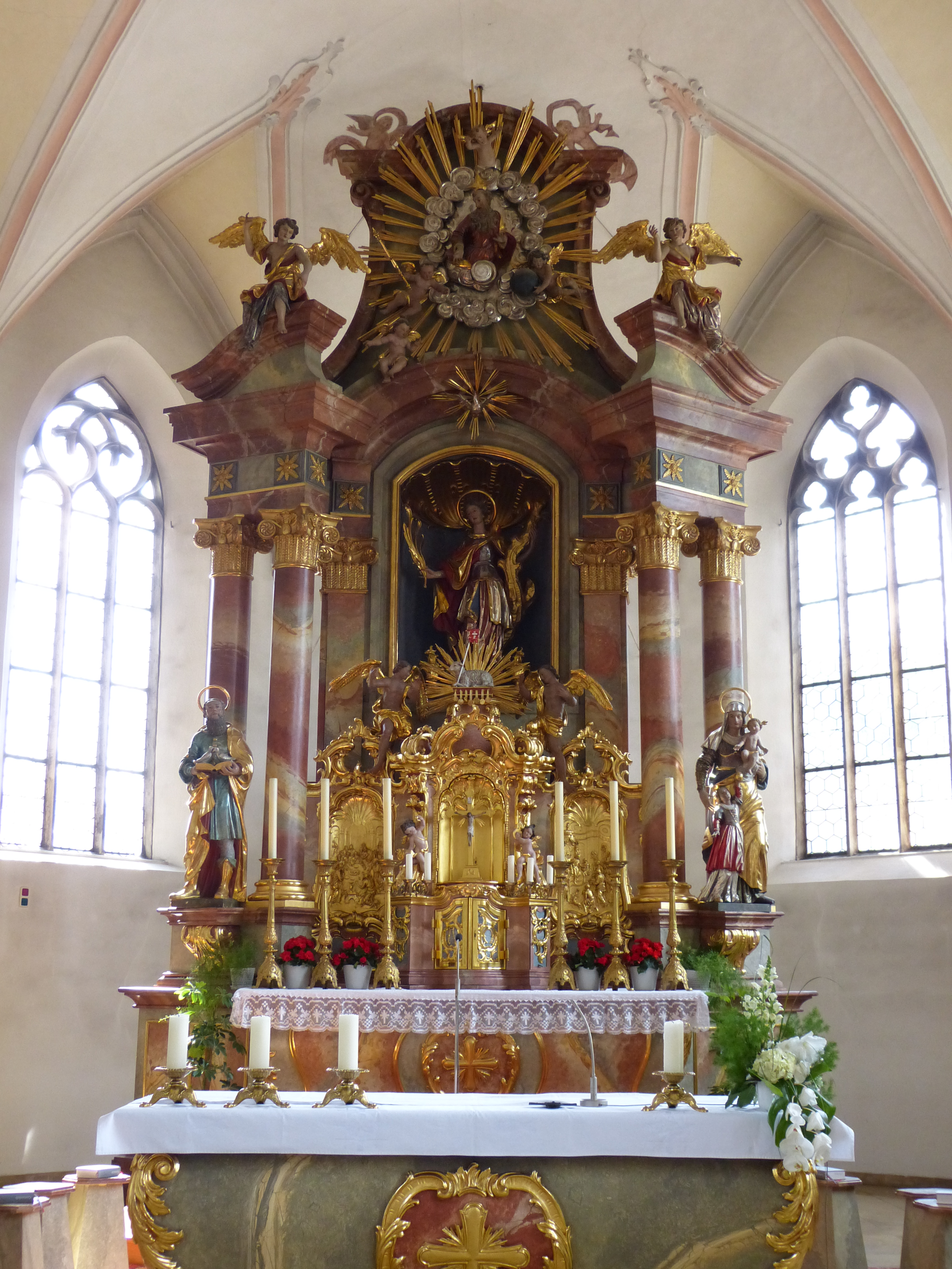 St. Afra Betzigau, Landkreis Oberallgäu, Bayern